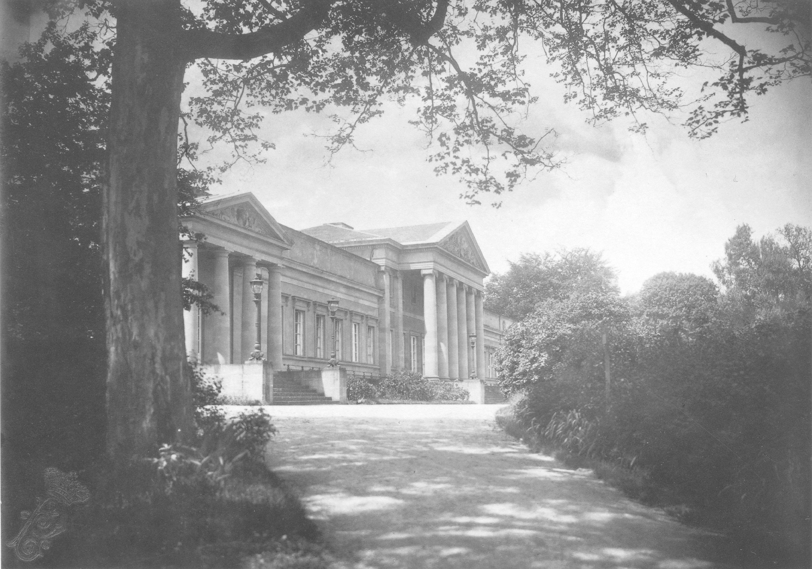 Nordostfassade, Stuttgart, Schloss Rosenstein. Foto von Herzog Philipp von Württemberg, 1898.